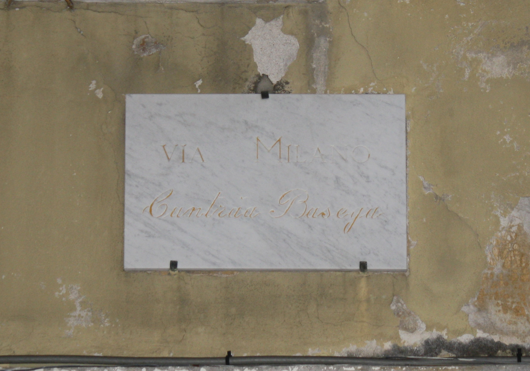 Targa indicante l'attuale nome della via Milano a Busto Arsizio e l'antico nome di Cuntràa Basega (contrada Basilica).